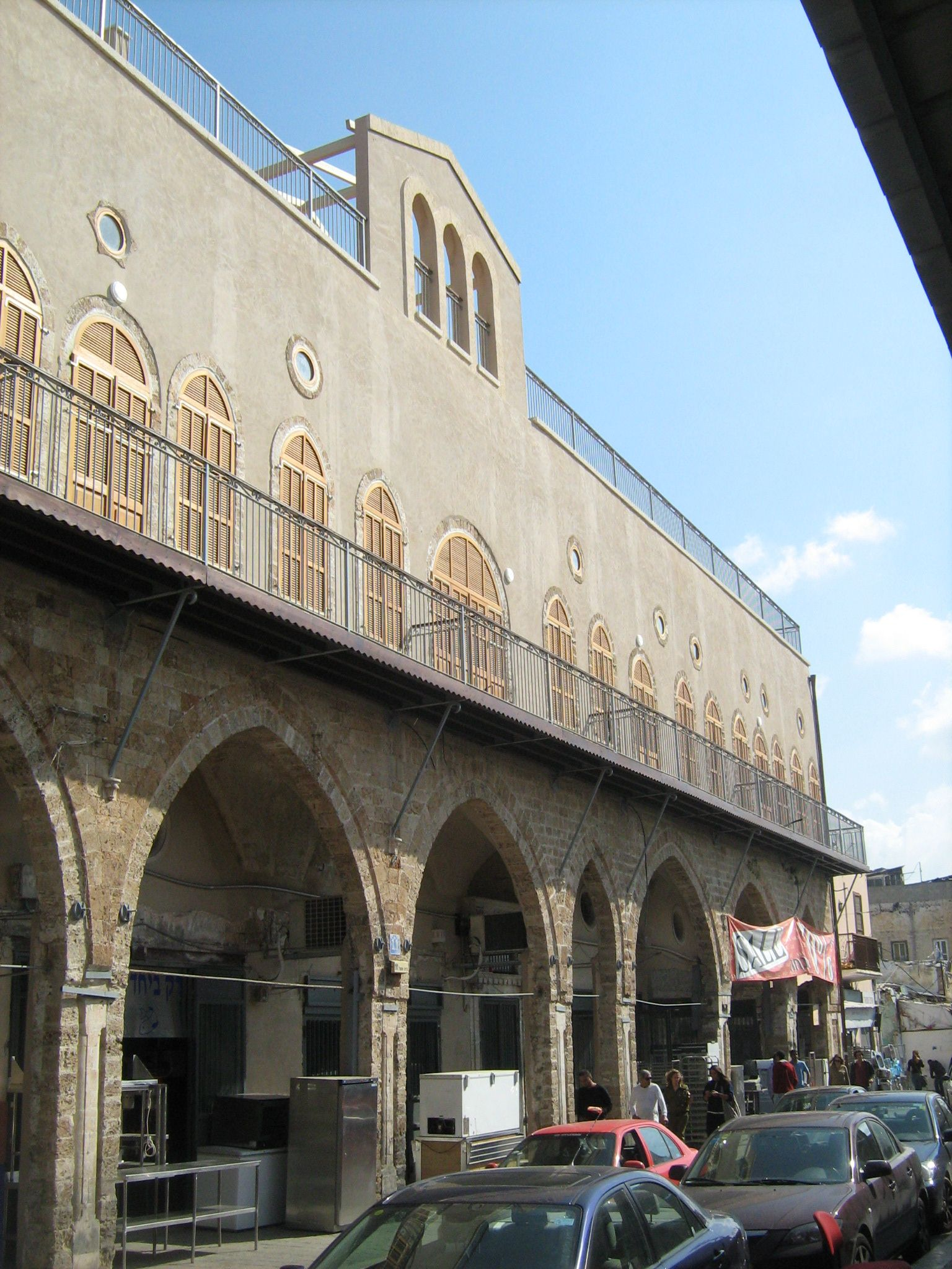 רחוב בית אשל